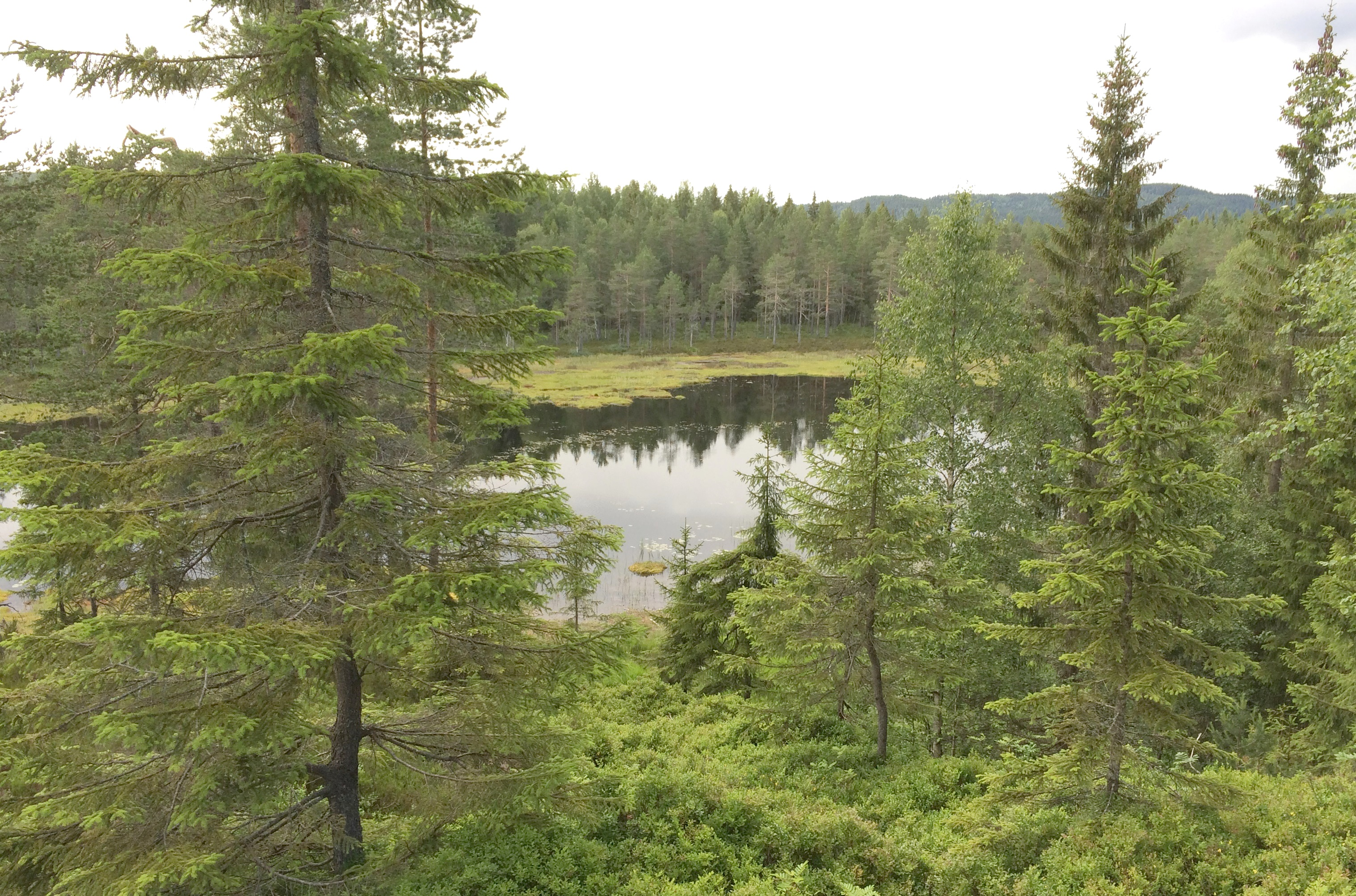 Svarttjern i Nordmarka i Oslo